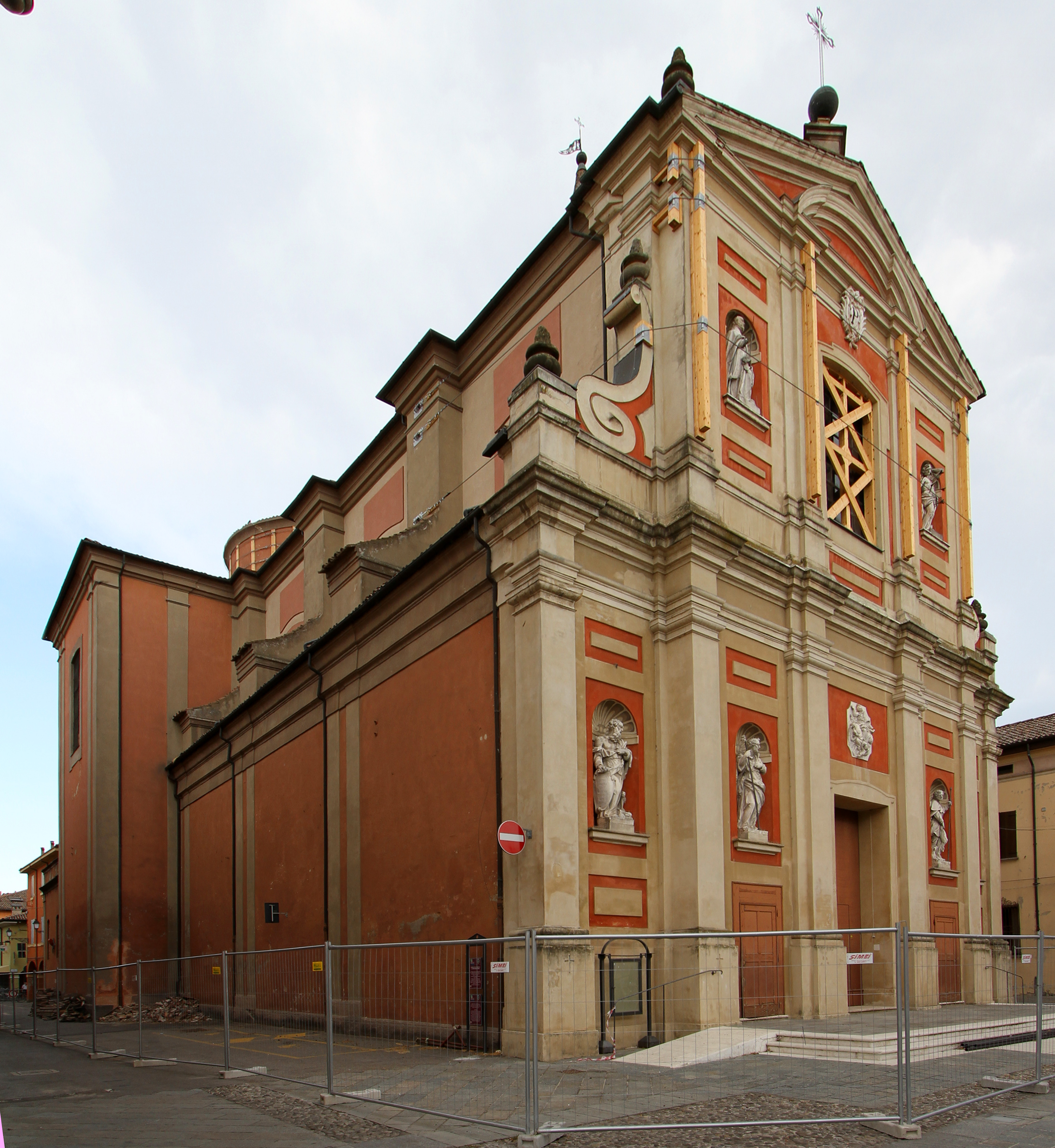 Pieve di Cento tre mesi dopo il terremoto: la chiesa parriocchiale di Santa Maria Maggiore.